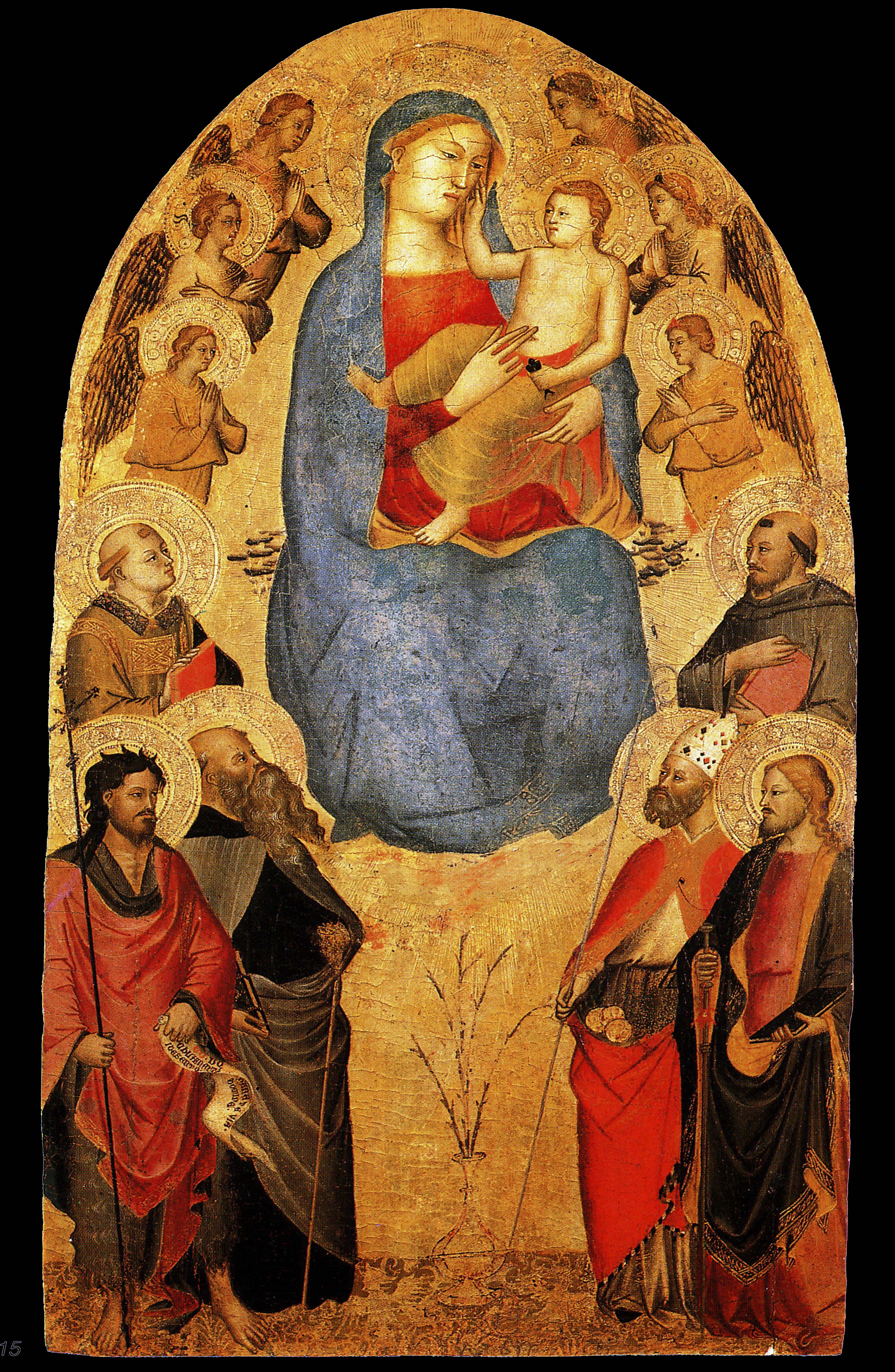 Madonna col Bambino tra Angeli e sei Santi, tempera su tavola dell'ultimo decennio del XIV secolo, opera di Maestro Francesco